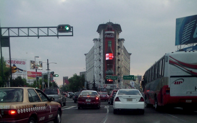 El Edificio Ermita, en Tacubaya, en la Ciudad de México, fue obra del arquitecto Juan Segura, es una joya del estilo art decó que se construyó entre 1929 y 1935.